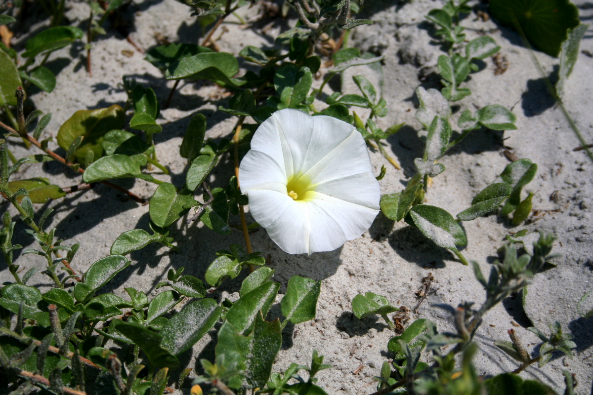 Ipomoea imperati